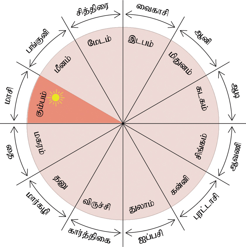 Drawn by the user who uploaded it here.